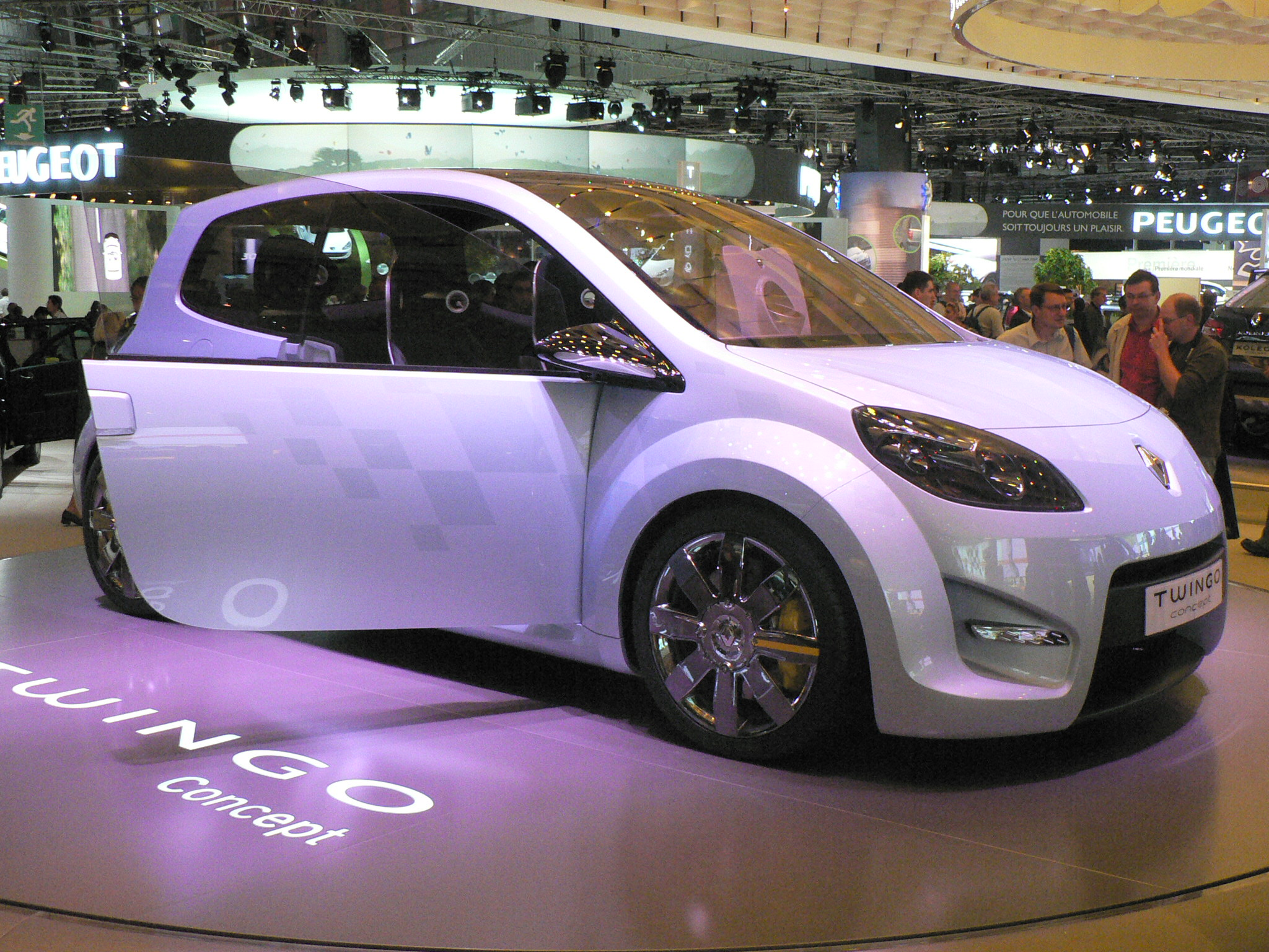 Mondial de l'automobile, Paris 2006